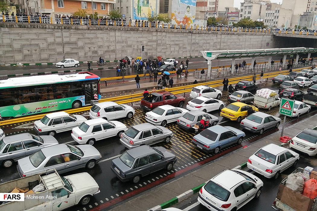 در جریان اعترضات مردمی به سهمیه‌بندی بنزین در ایران، توقف عمدی خودروها در انتقاد به گرانی بنزین در بعضی بزرگراه‌های تهران، موجب ترافیک سنگین و طولانی ماشین‌ها شده در این بزرگراه‌ها شده و صف طولانی از ماشین‌ها را متوقف کرده‌است. برخی رانندگان نیز با زدن بوق نسبت به گرانی بنزین اعتراض می‌کنند.